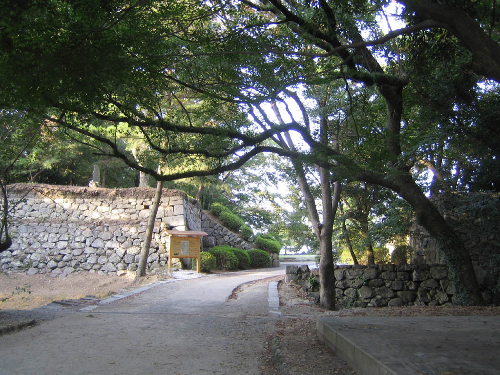 Yoshida Castle (吉田城), Toyohashi, Aichi, Japan